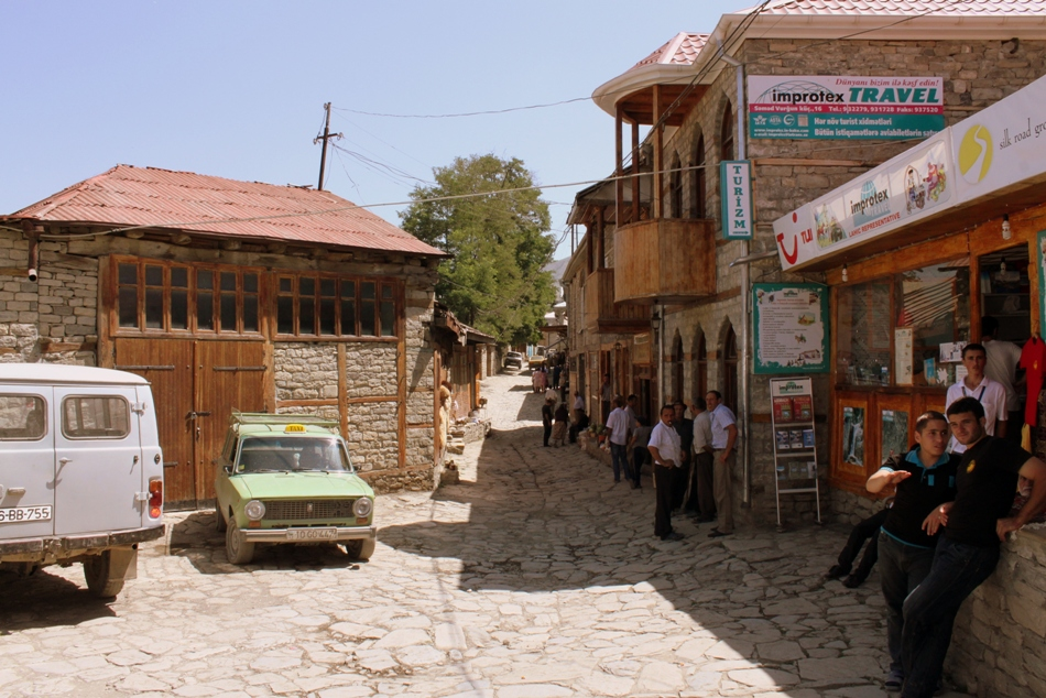 Село Лагич, Исмаиллинского района Азербайджана.